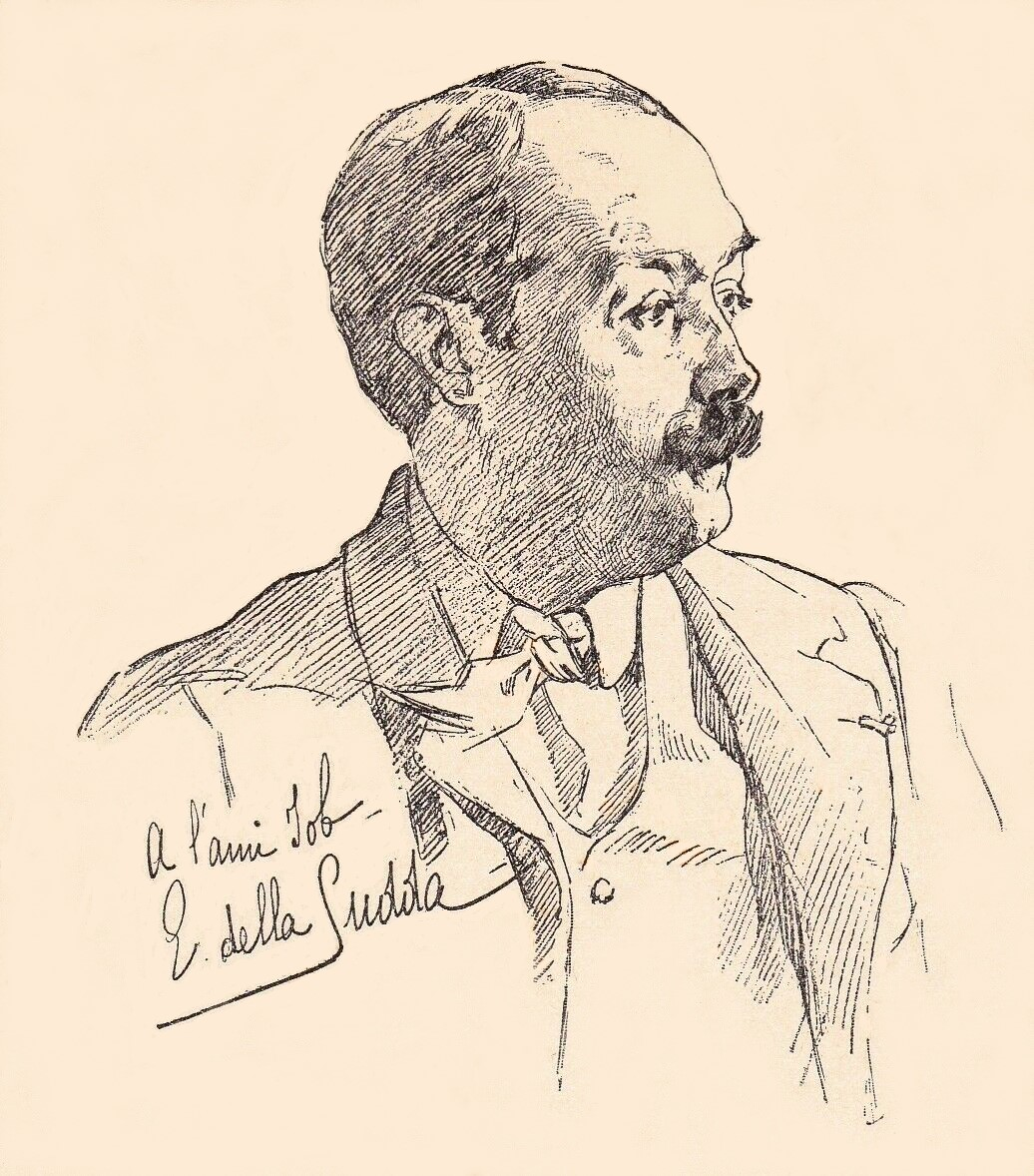 French illustrator Job (Jacques Onfroy de Bréville) (1858-1931)